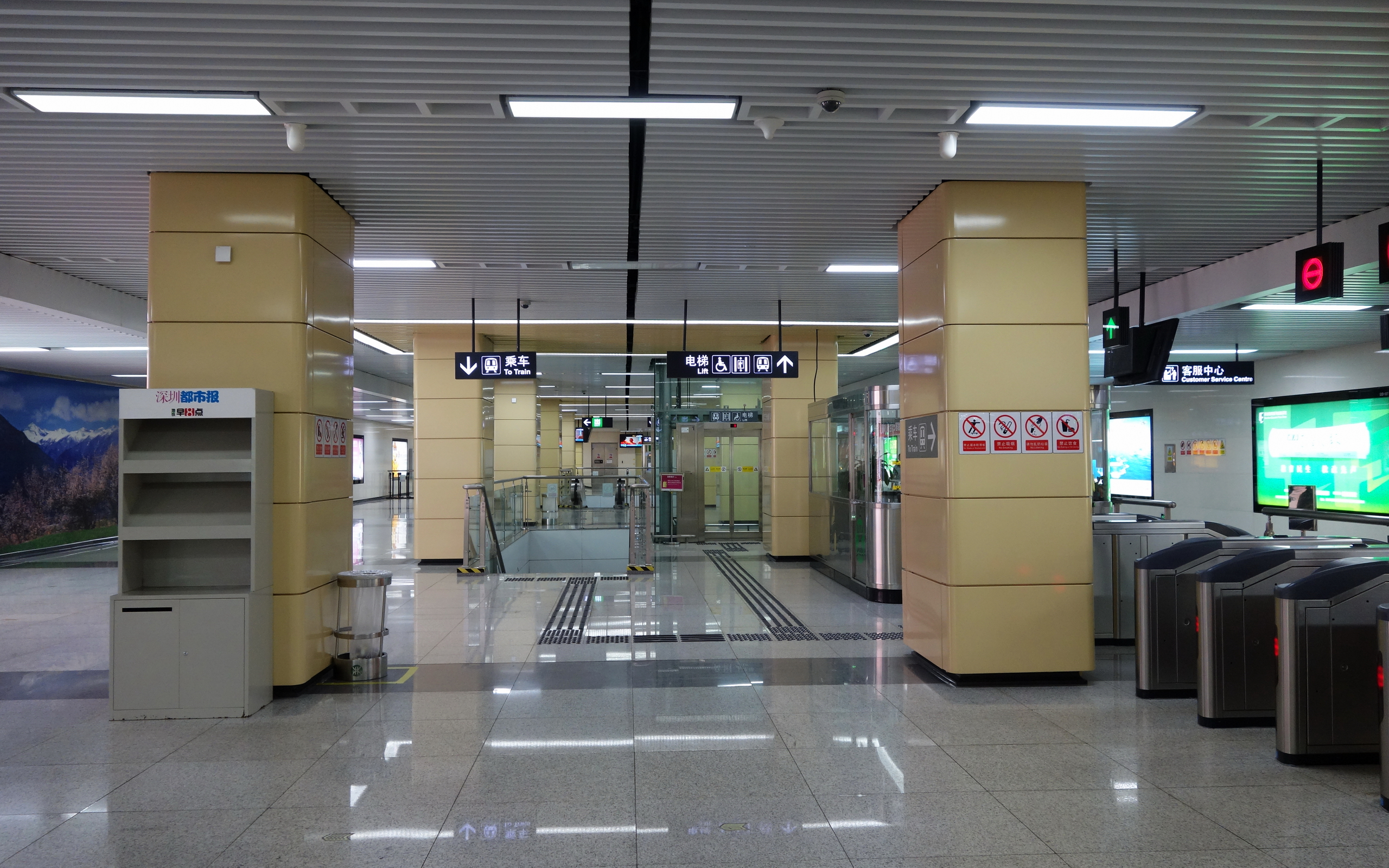 蛇口线岗厦北车站站厅层